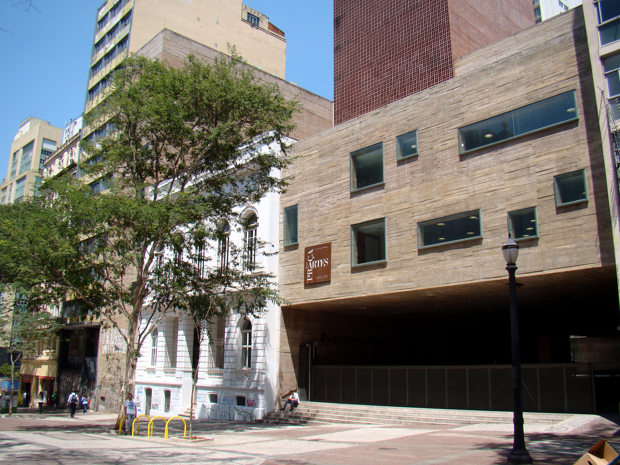 Conservatório Dramático e Musical de São Paulo e prédio da Praça das Artes, na qual é feita a entrada para o interior do conservatório